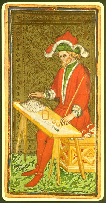 Magician. Pierpont Morgan, Visconti Sforza